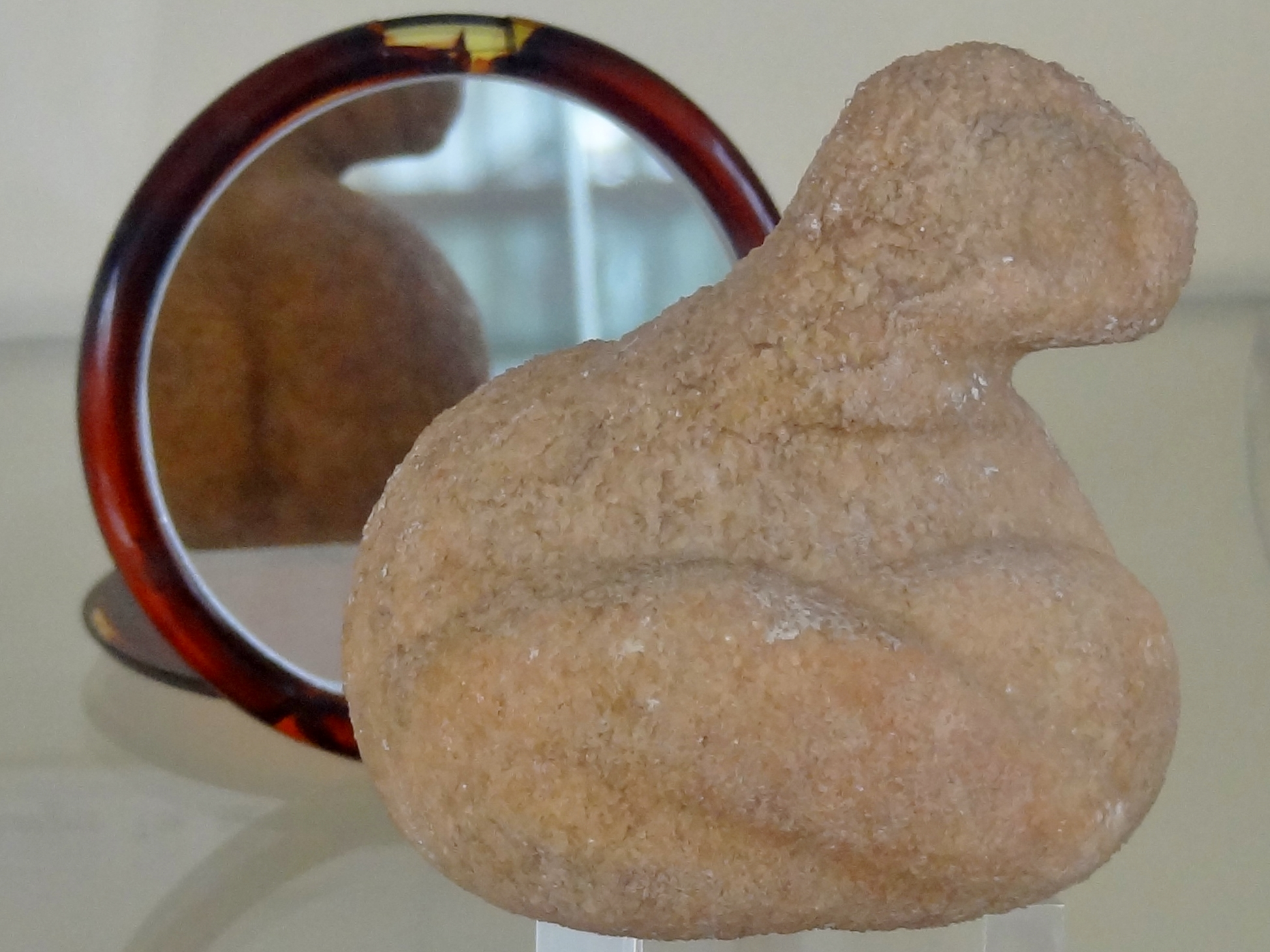 „Fette Frau von Saliagos“ aus dem 4. Jahrtausend v. Chr. im Archäologischen Museum von Parikia auf Paros, Kykladen, Griechenland